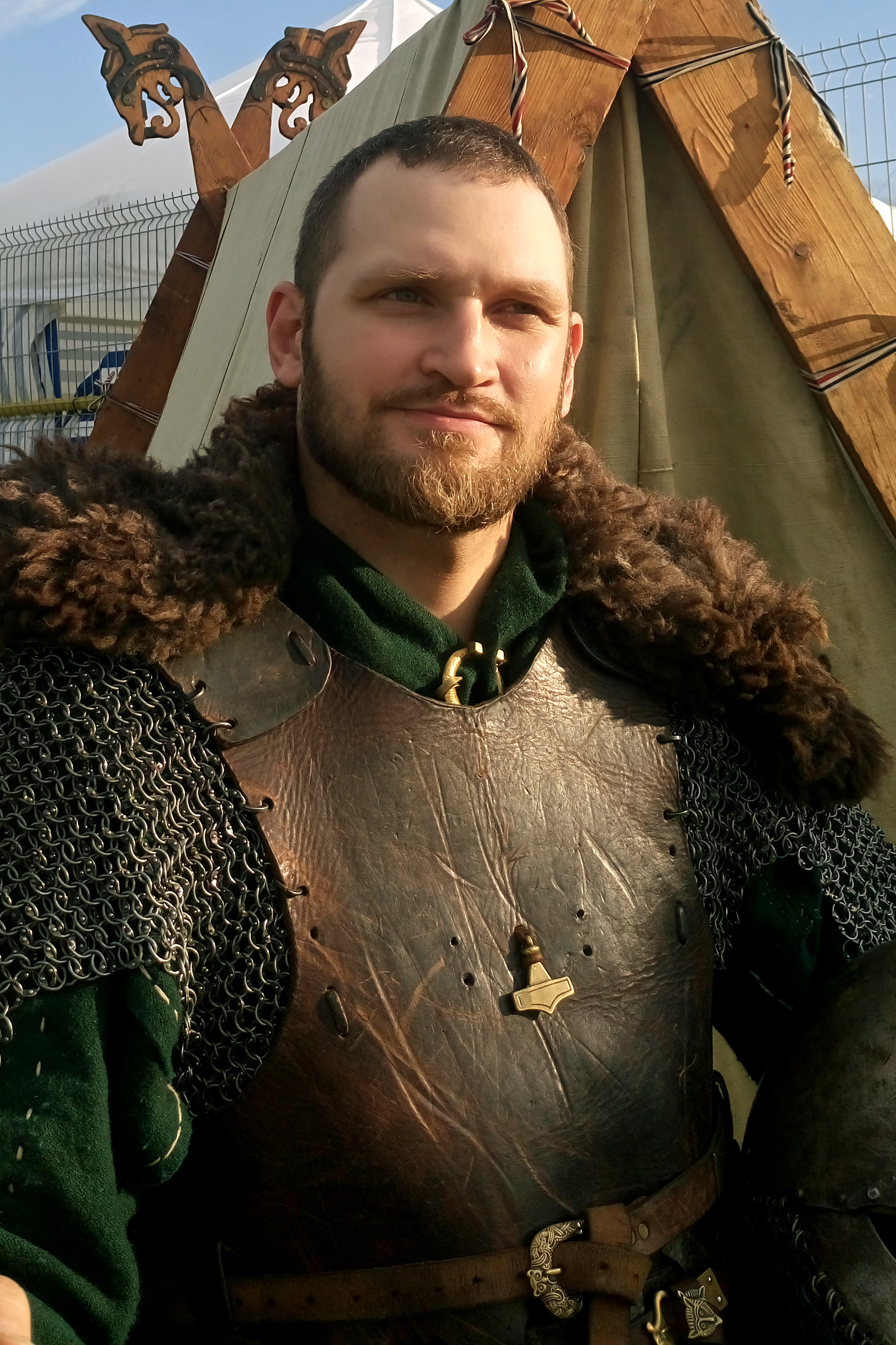 Raivo Ird 2016